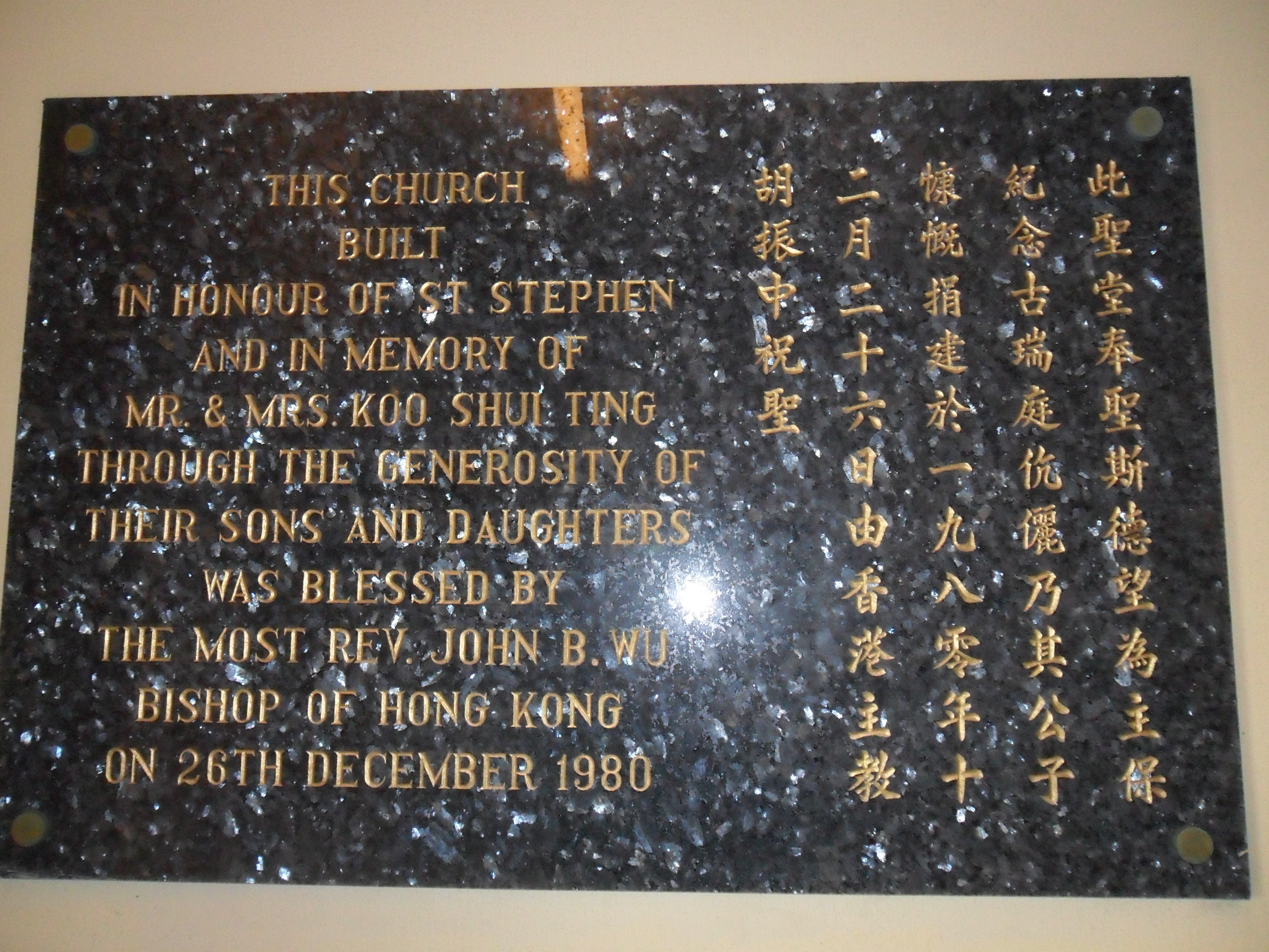 中文（香港）: 聖斯德望堂, 香港, 中國